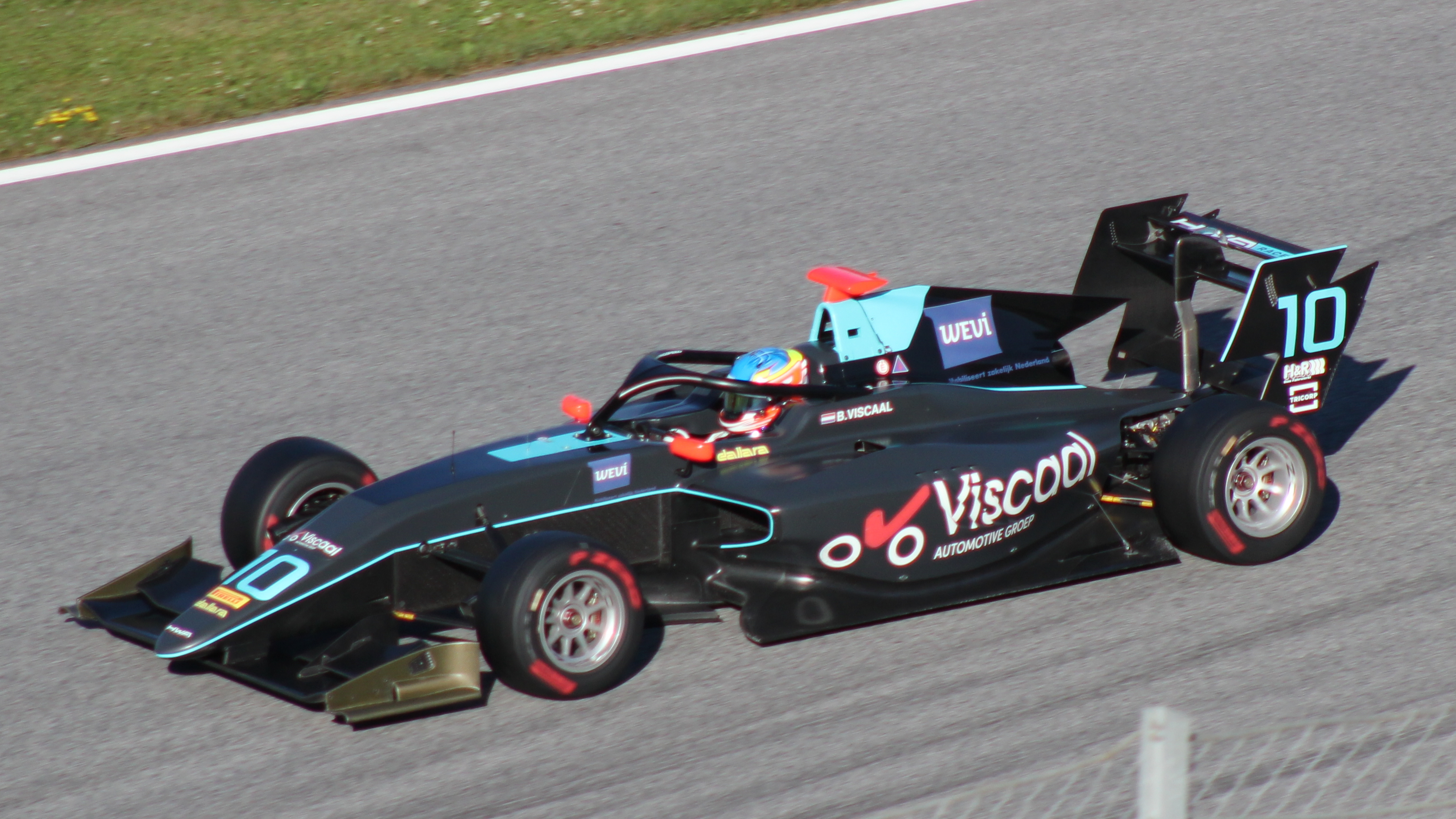 Viscaal beim Rennwochenende in Österreich 2019